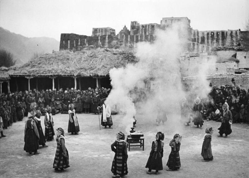 Tibetexpedition, Tibetische Tanzgruppe Tschitischio, tibetische Tanzgruppe [Chitichio, Ache Lhamo]